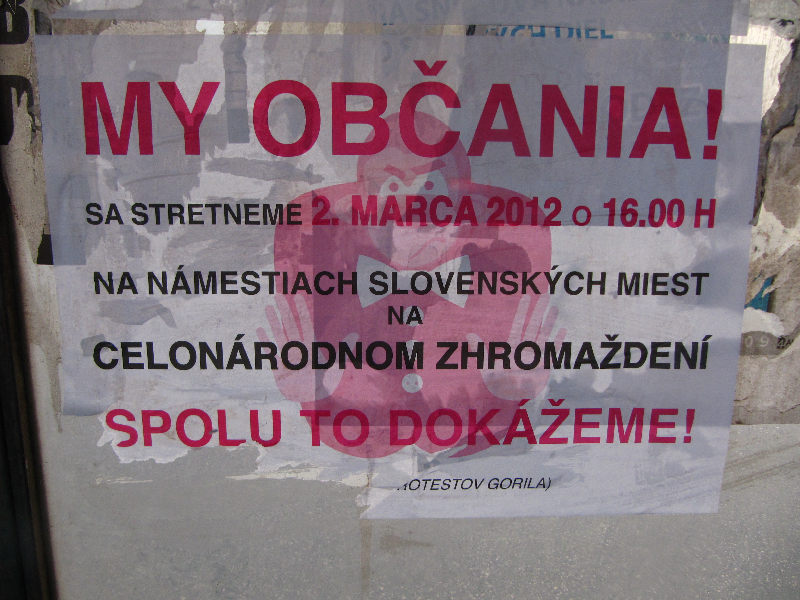 Pozvánka na protest Gorila